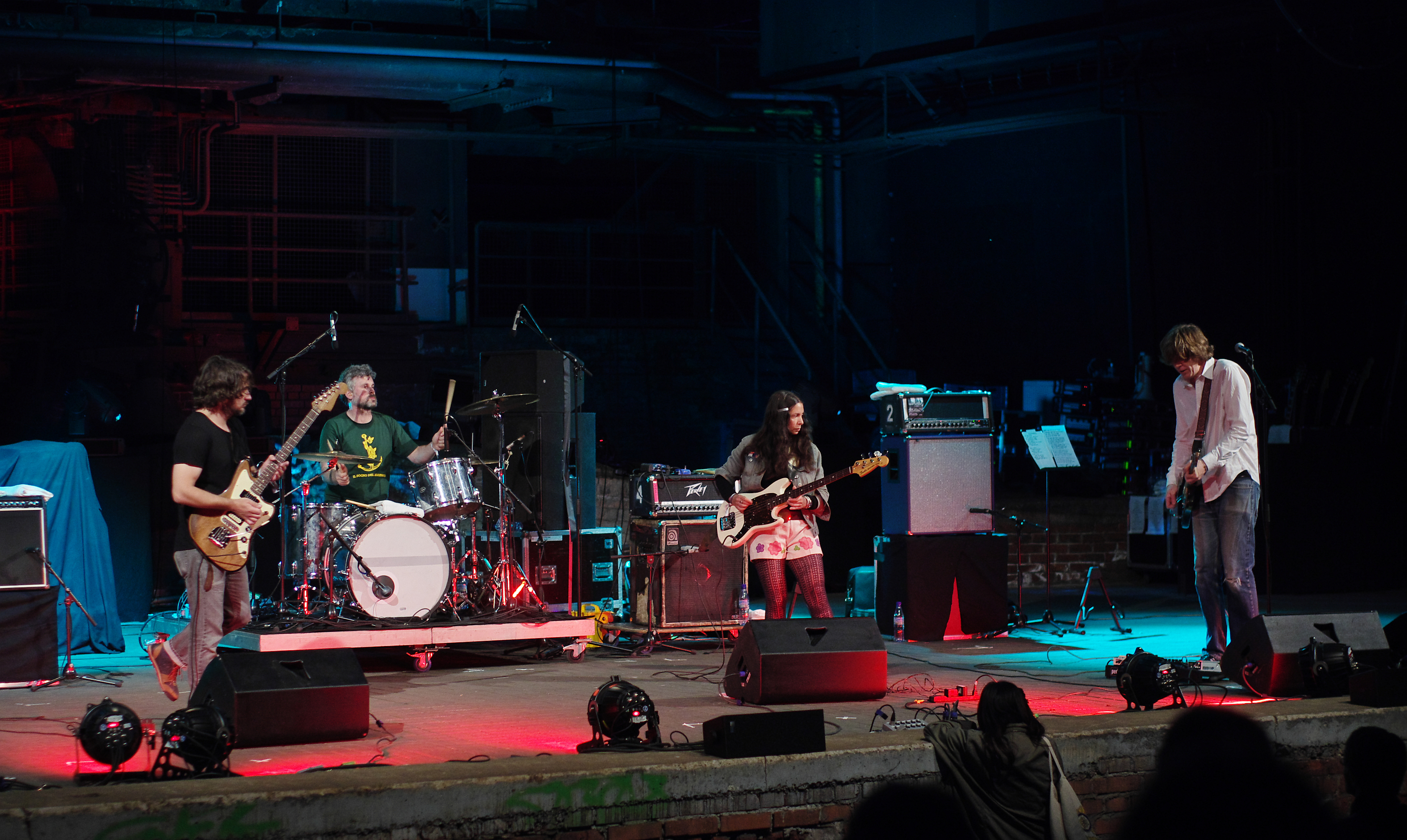 Chelsea Light Moving beim Traumzeit-Festival 2013 in Duisburg. Besetzung: Samara Lubelski (bass), John Moloney (dr), Thurston Moore (voc, git), Keith Wood (git)